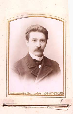 Адам Ягоравіч Багдановіч – бацька Максіма Багдановіча. г. Ніжні Ноўгарад. [1896-1899 гг.].